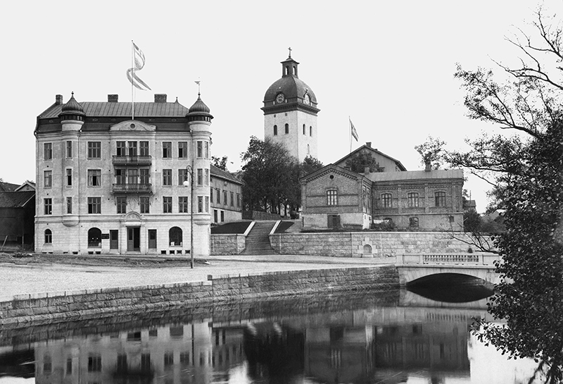 Nybroplan. I mitten tornet på Caroli kyrka. Motiv: Borås Kategori: Stadsmiljö, (01) Exteriörer Nybroplan. I mitten tornet på Caroli kyrka. Till vänster gamla BT-huset. Byggnadsår 1903. Arkitekt: Lars Kellman